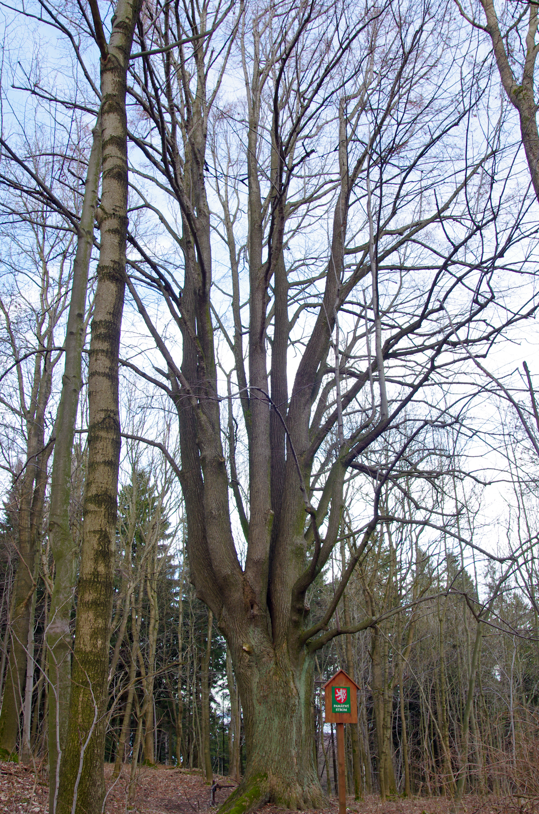 památný strom - Pasecká lípa v místě zaniklé obce Paseka ve Slavkovském lese